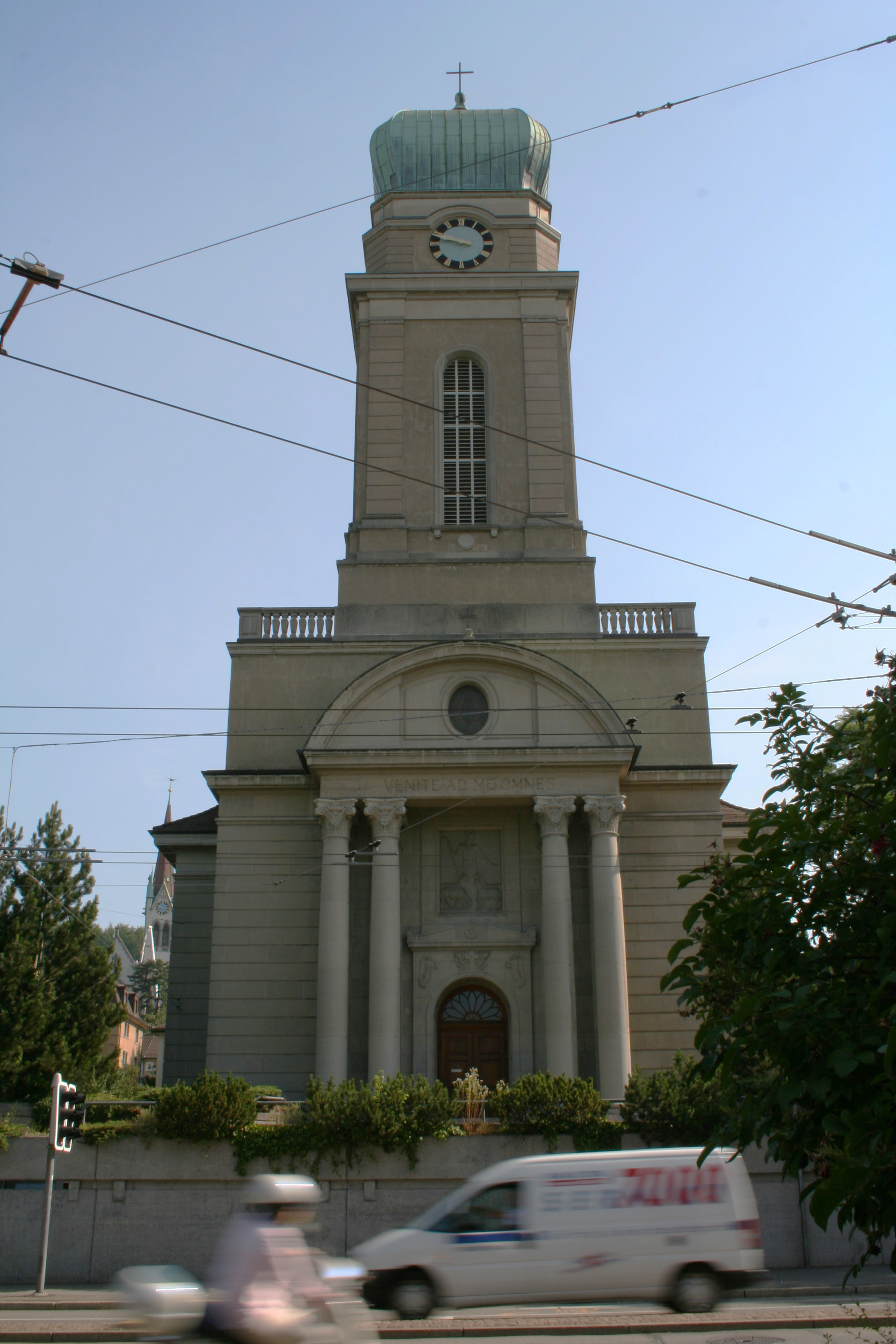 Guthirt Kirche in Zürich, Schweiz. Die Kirche steht direkt an der stark befahrenen Nordstrasse und in der Nähe der noch stärker befahrenen Rosengartenstrasse. Sie wurde 1922/23 vom Architekten Anton Higi gebaut.